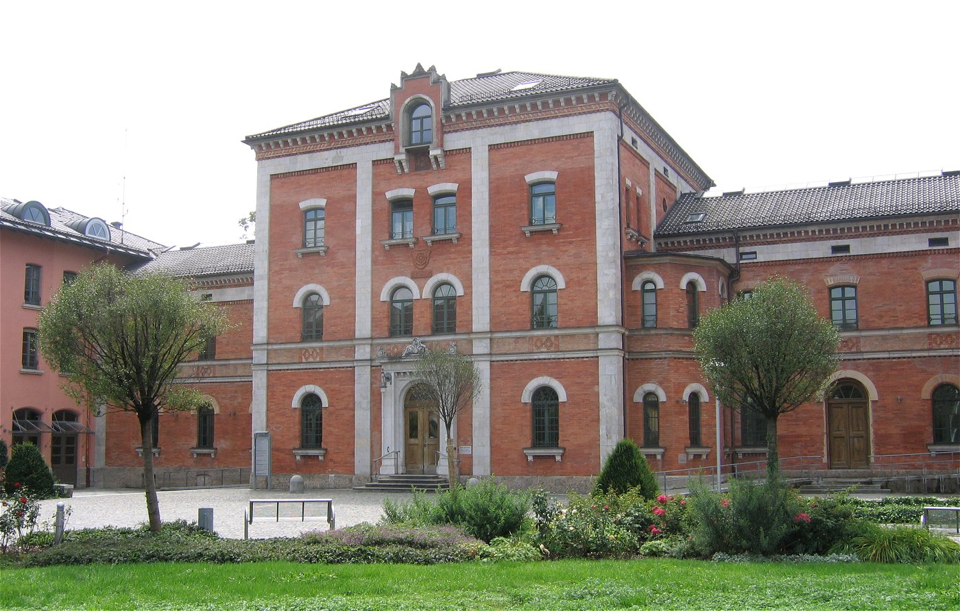 Rosenheim, Rathaus